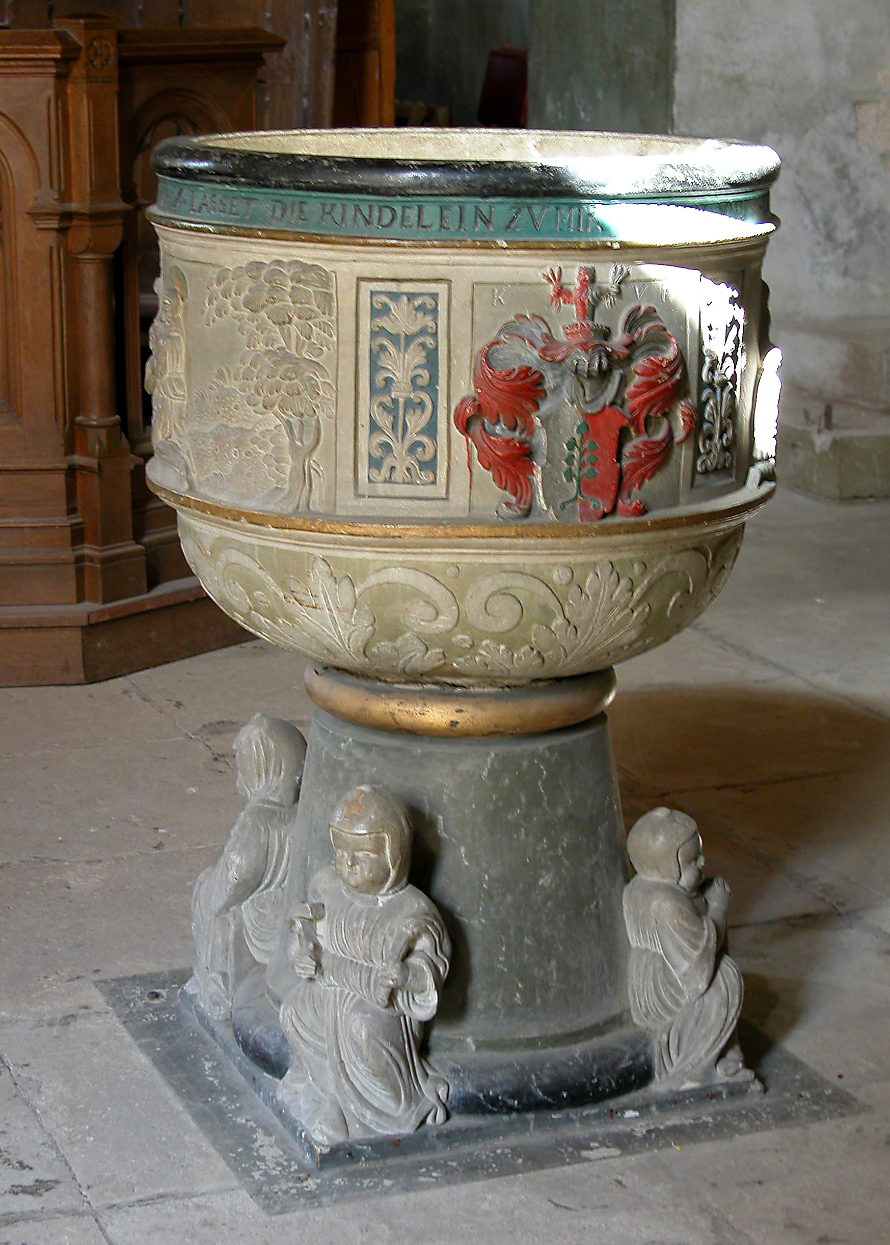 06.09.2007 01665 Constappel (Klipphausen): Ev.-Luth. Dorfkirche St. Nikolai. Im Kern spätromanisch, später stark verändert. 1884 erweitert. Taufstein. (GMP: 51.104810,13.565966). [DSCN29388.TIF]20070906425DR.JPG(c)Blobelt